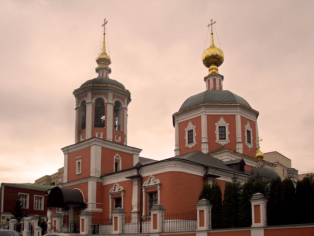 Московское подворье Свято-Троице-Сергиевой Лавры